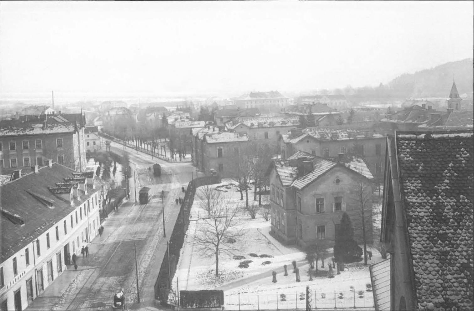 Pogled na Ijubljansko bolnico